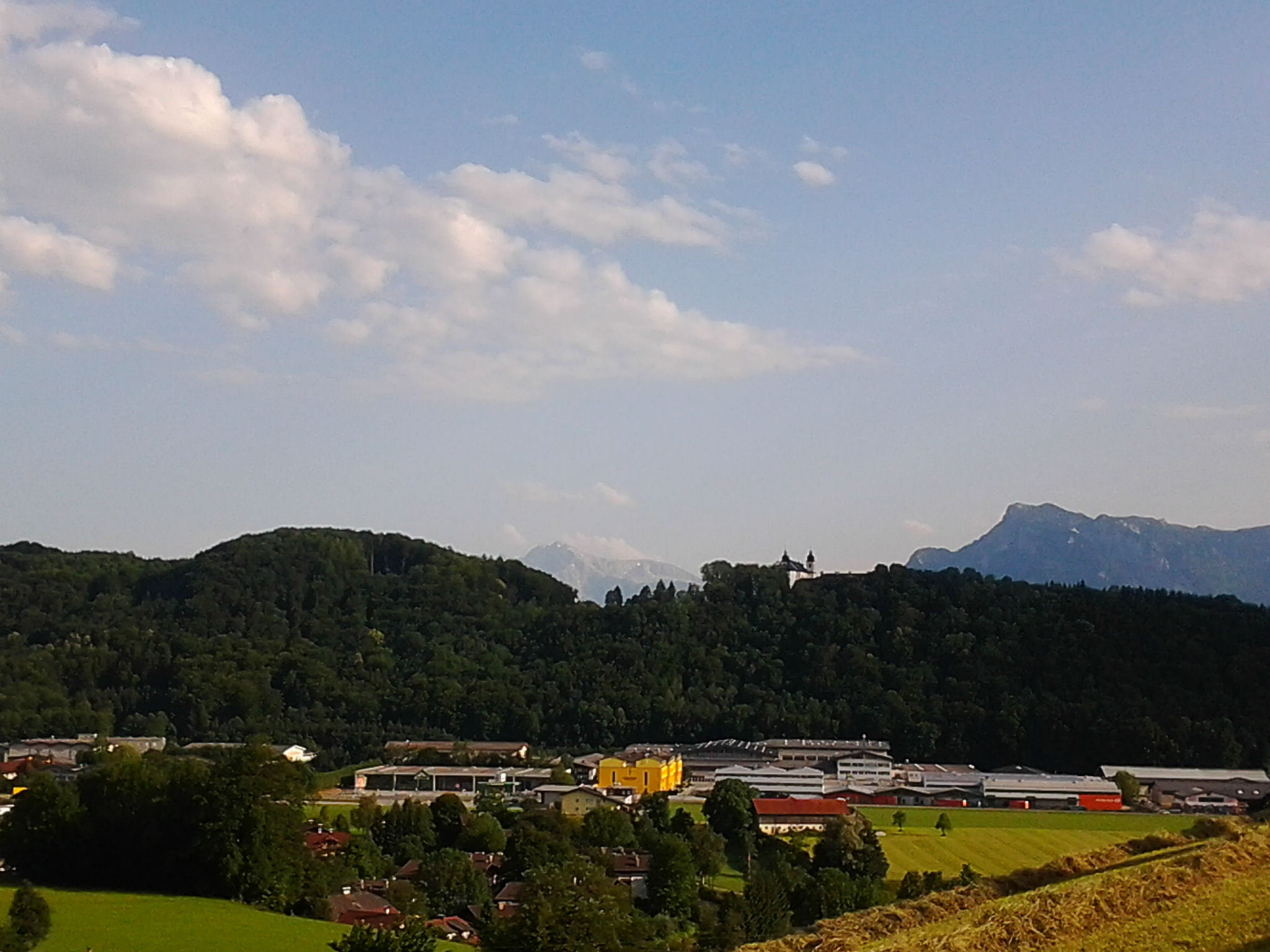 Plainberg Nordseite vom Hochgitzen aus gesehen; am Fuß das Gewerbegebiet Bergheim.